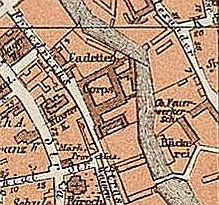 Lage des Neubaus des Berliner Kadettenhauses 1877